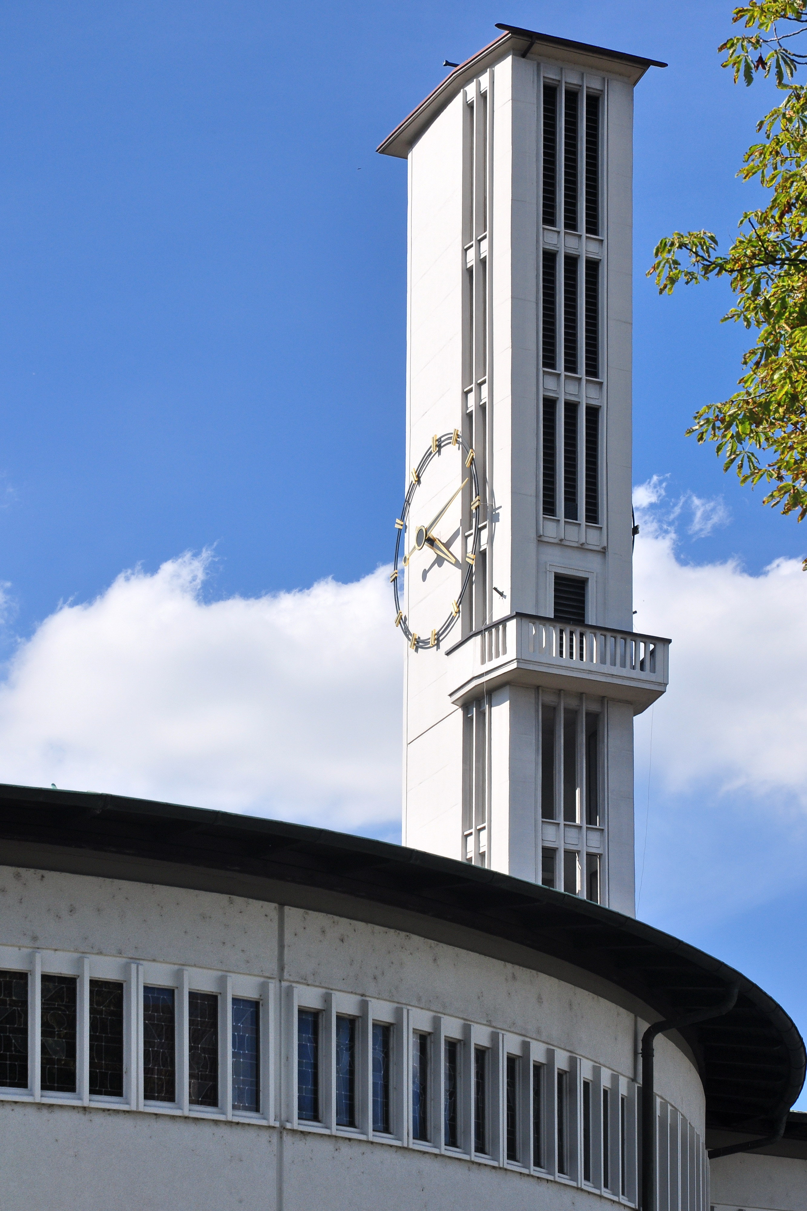 Katholische Kirche Felix und Regula in Zürich-Hard (Switzerland)